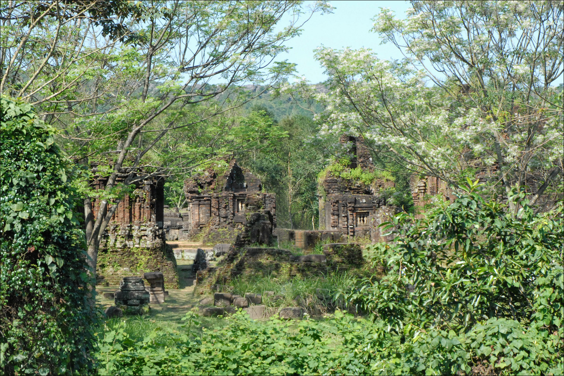 Le sanctuaire principal (kalan) - groupes B, C, D voir le plan Le site de My Son se situe à une trentaine de kilomètres de la ville de Hoi An. Il s'agit de l'un des lieux les plus importants de l'ancien royaume Champa. Le site a été étudié par des scientifiques de l'Ecole Française d'Extrême Orient (EFEO) : Henri Parmentier et ses successeurs. Bien que très endommagé, My Son, construit à partir du 7ème siècle, demeure un site historique, classé au patrimoine mondial par l'UNESCO. Le site comprend environ 70 ouvrages architecturaux de briques et de pierres au cœur d'une nature foisonnante. Ces édifices étaient tous ornés de frises sculptés et autres décors, propres à l’art Cham. Les oeuvres majeures sont présentées au musée Cham de Da Nang. L'objet de culte dans les temples principaux de My Son est le linga, symbole de Shiva - protecteur des rois Cham. Le site, proche de la piste Ho Chi Minh, a été en partie détruit par des bombardements américains durant la guerre.